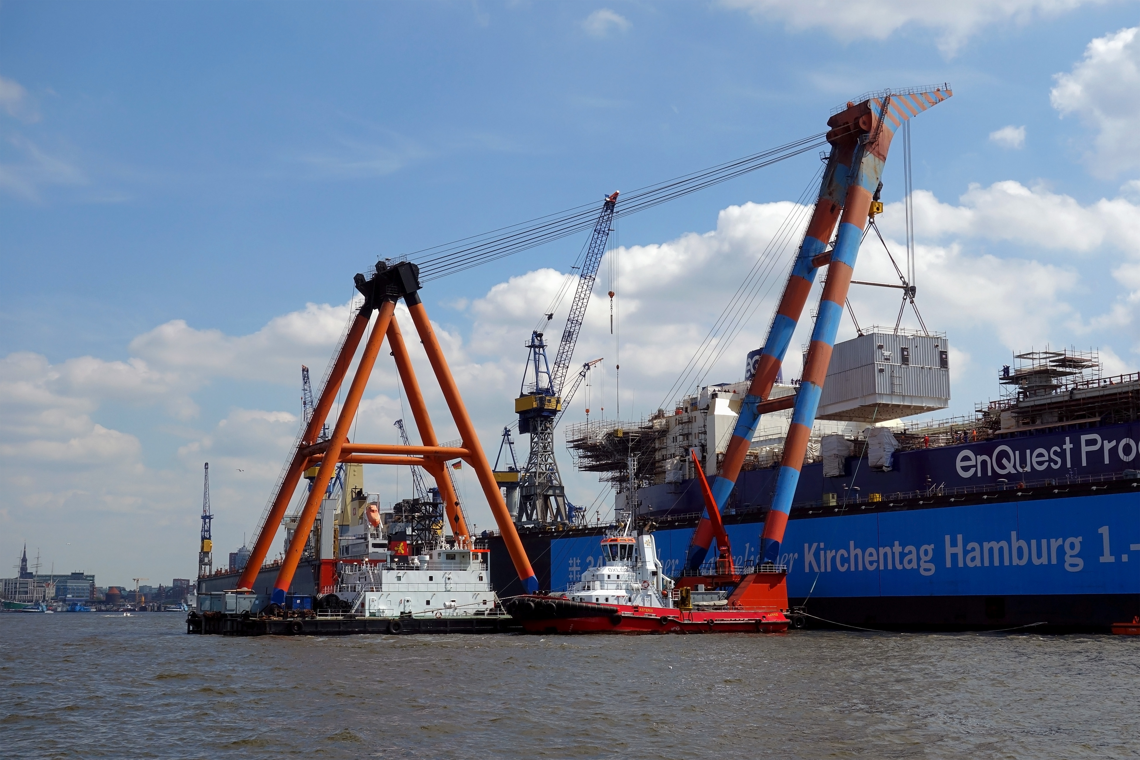 Der Schwimmkran Samson im Hamburger Hafen. Es handelt sich um ein Schwimmkran mit einer maximalen Hubkraft von 900 Tonnen 67 Meter Hubhöhe. Der Schwimmkran ist Baujahr 1998.